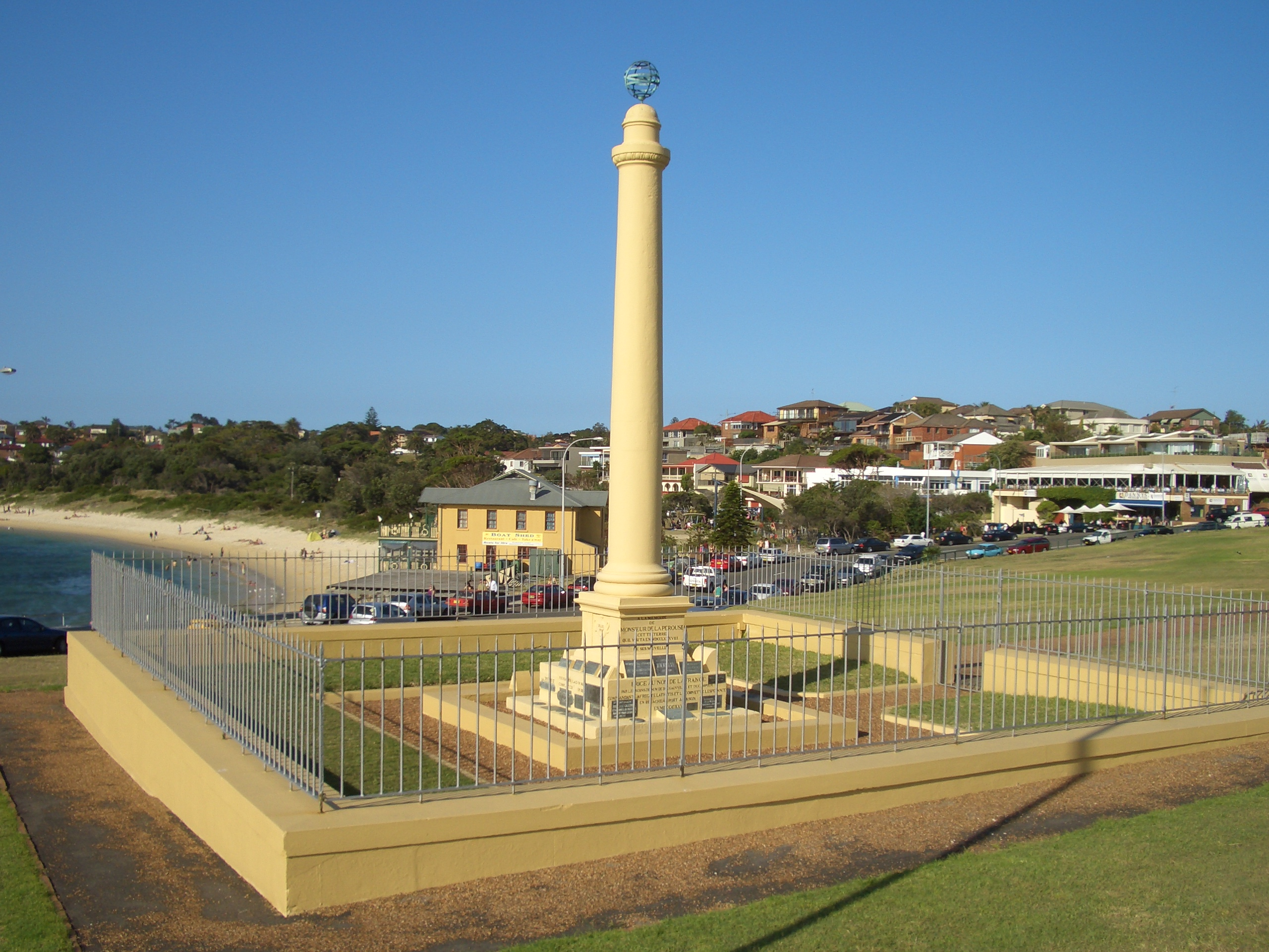 La Perouse Monument